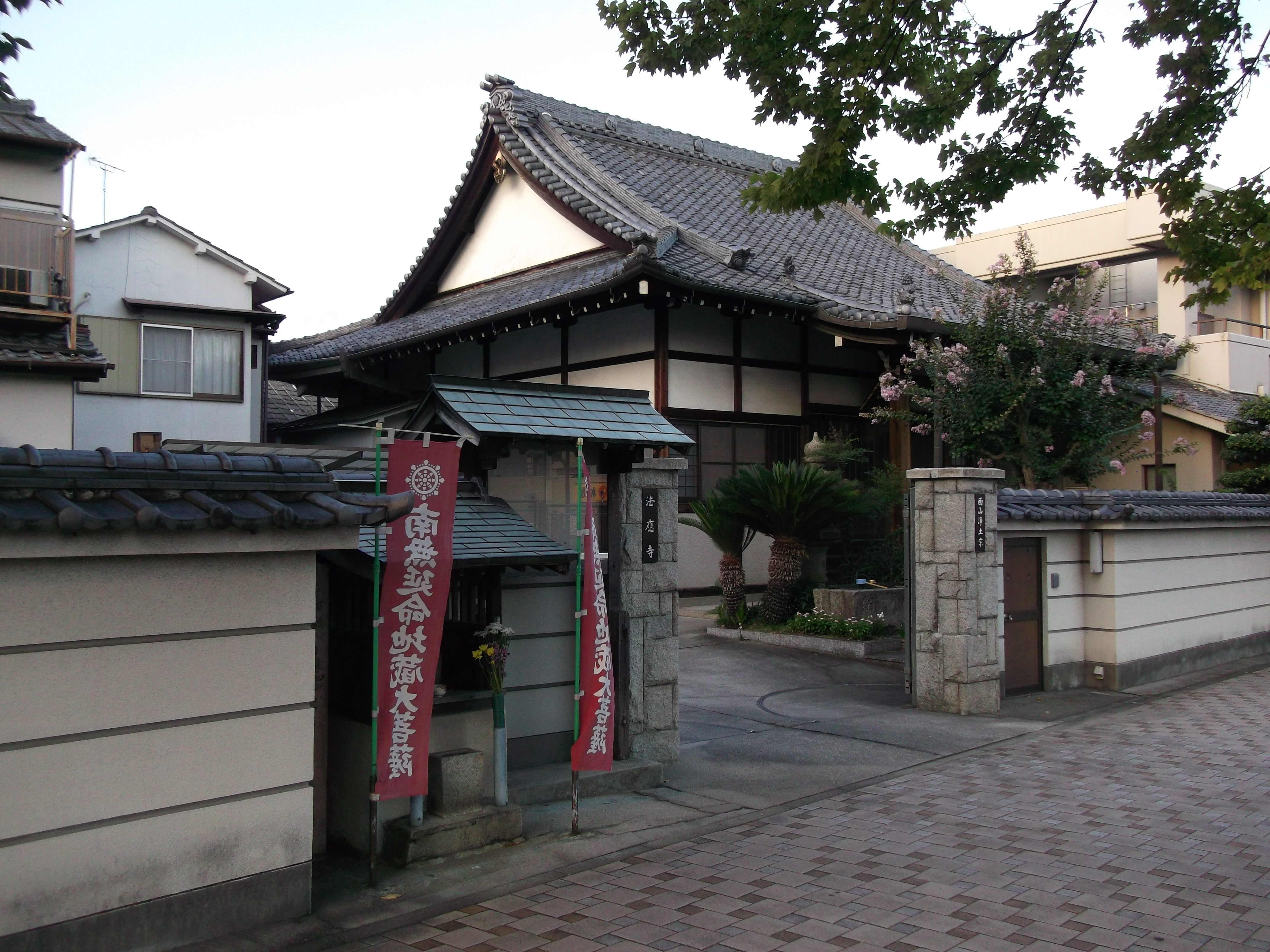 名古屋市千種区青柳町の法応寺を南側公道西側より撮影